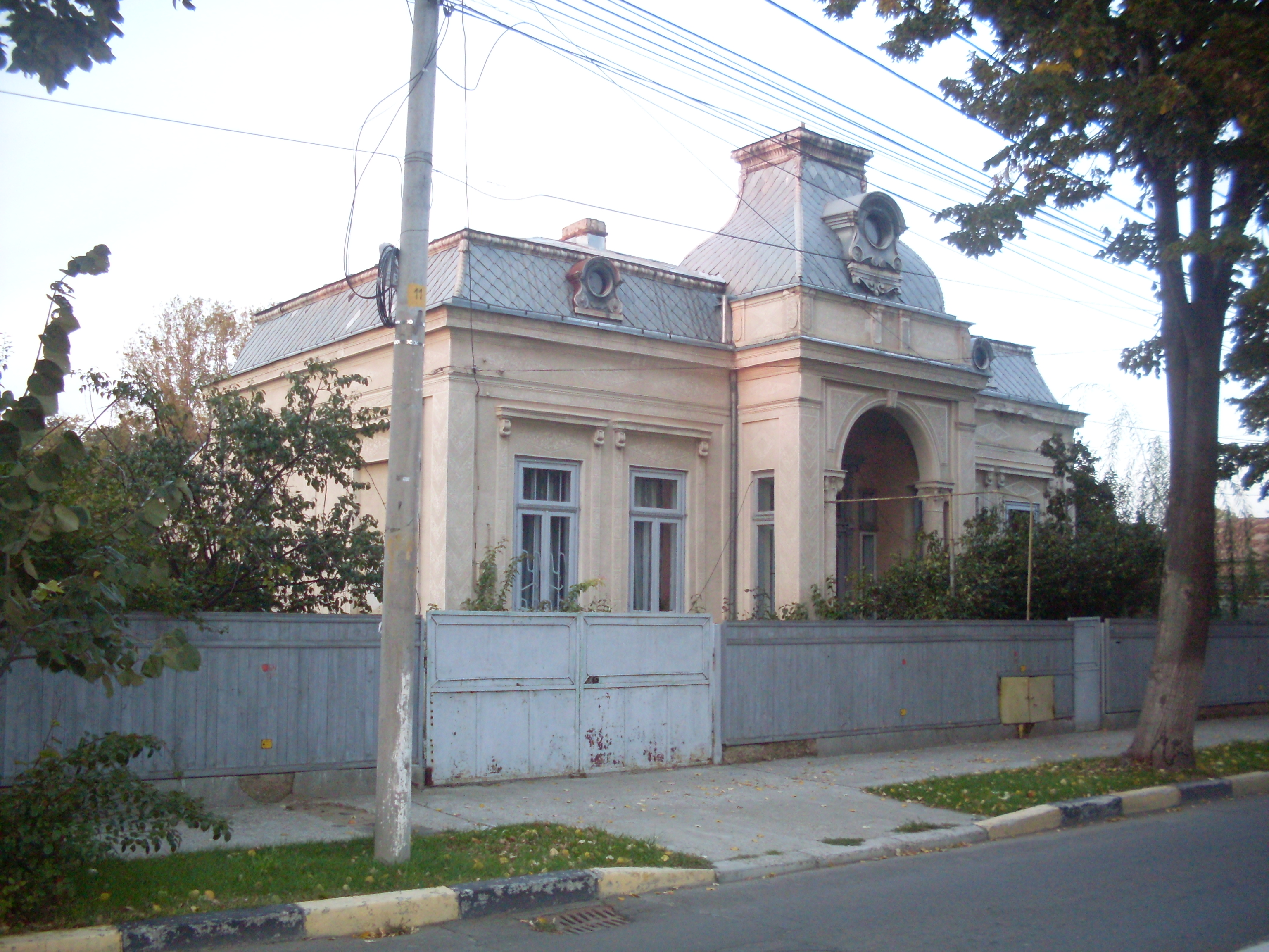 Casa Tudor Pamfile